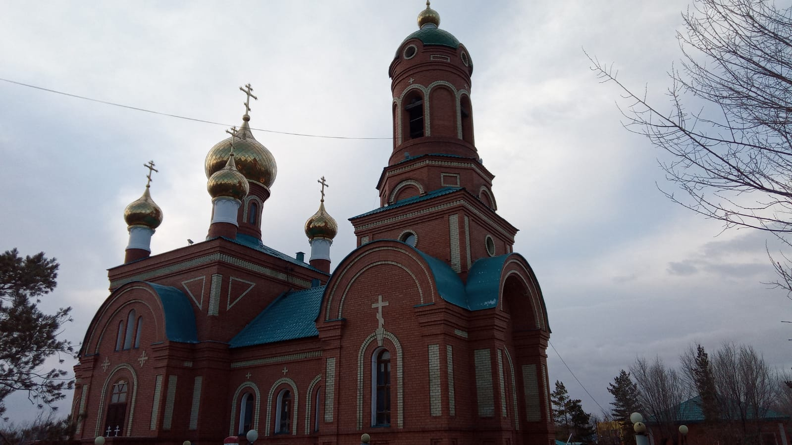 Храм преподобного Серафима Саровского. Хромтау